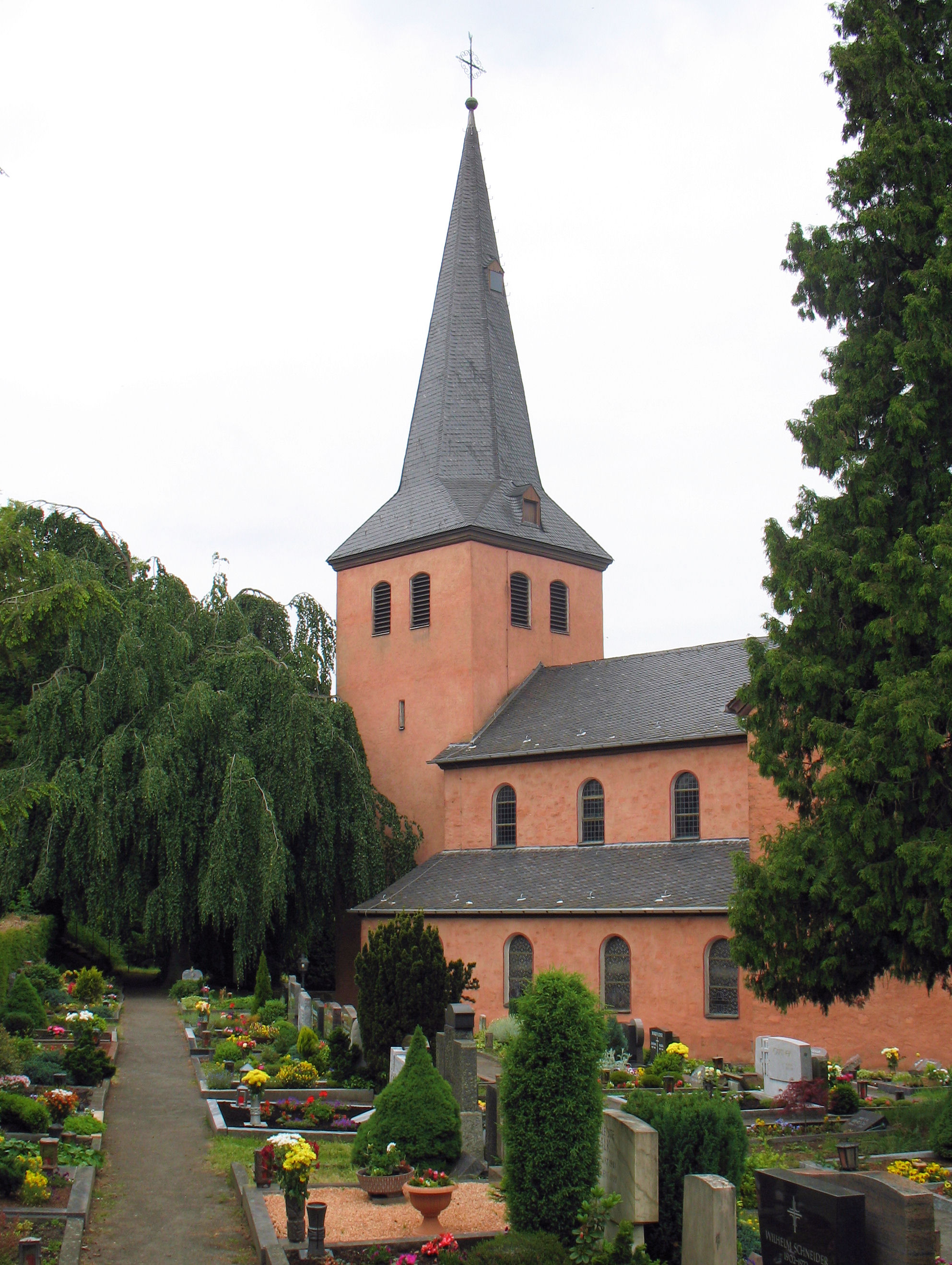 Kirche St. Georg in Troisdorf-Altenrath